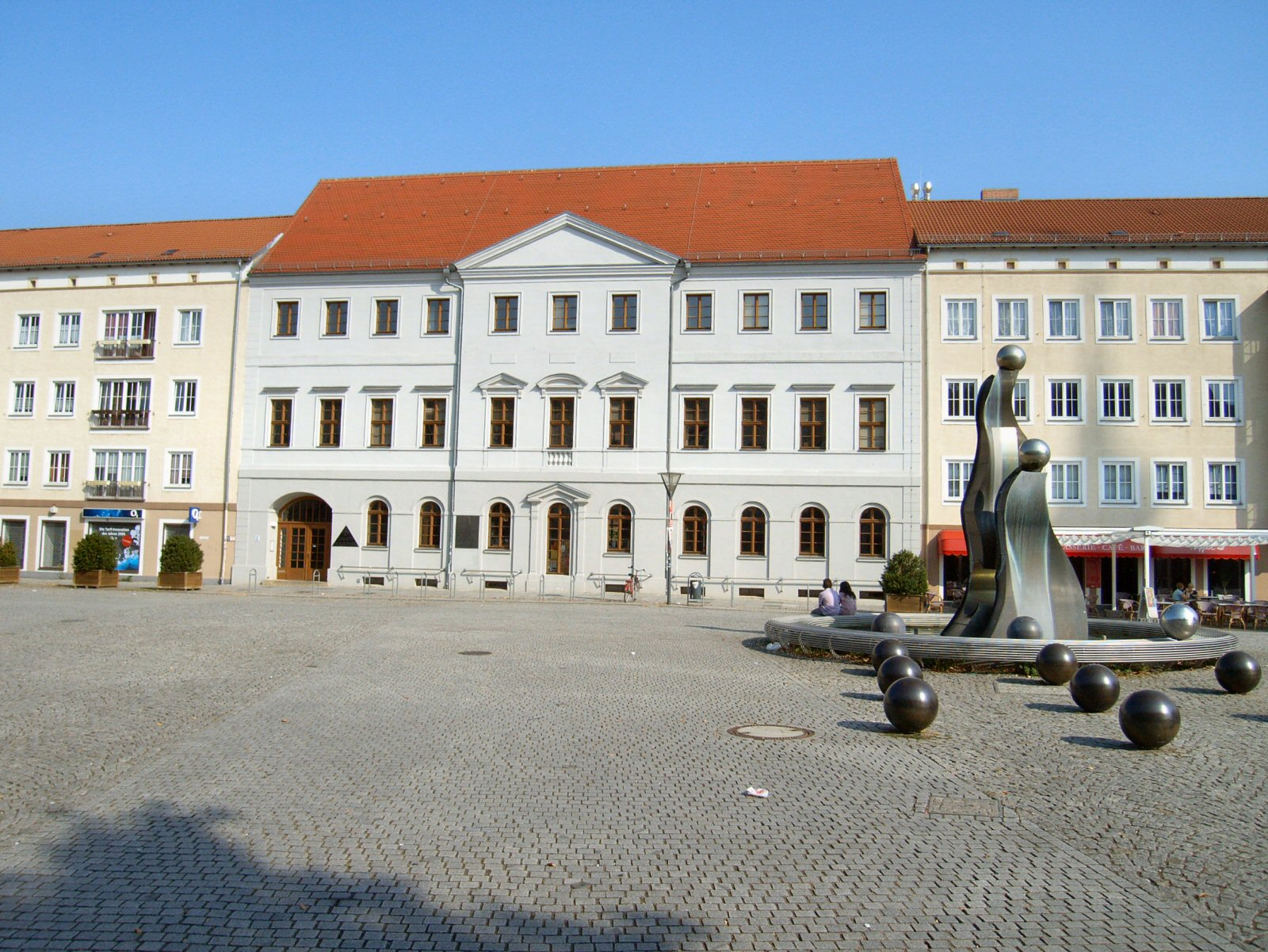 Dessau,Anhaltische Landesbücherei,Hauptbibliothek, ehemals Palais Waldersee